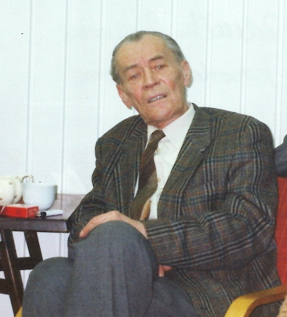 Zdeněk Rotrekl v roce 1996